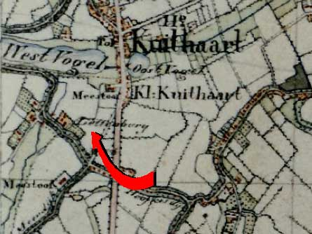 detail van een kadasterkaart van Hulst en omgeving met Lettenburg (door mij aangegeven met een rode pijl)